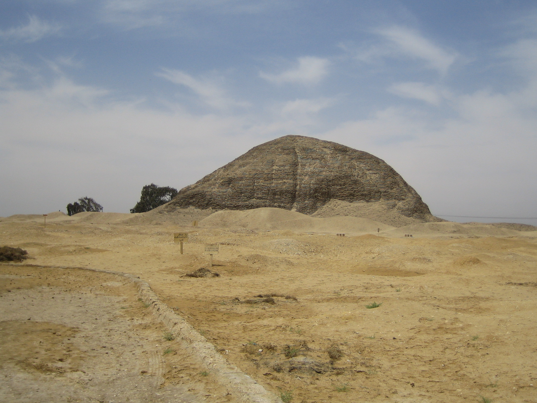 Pyramide von Hawara in Ägypten, Nekropole von Pharao Amenemhet III.